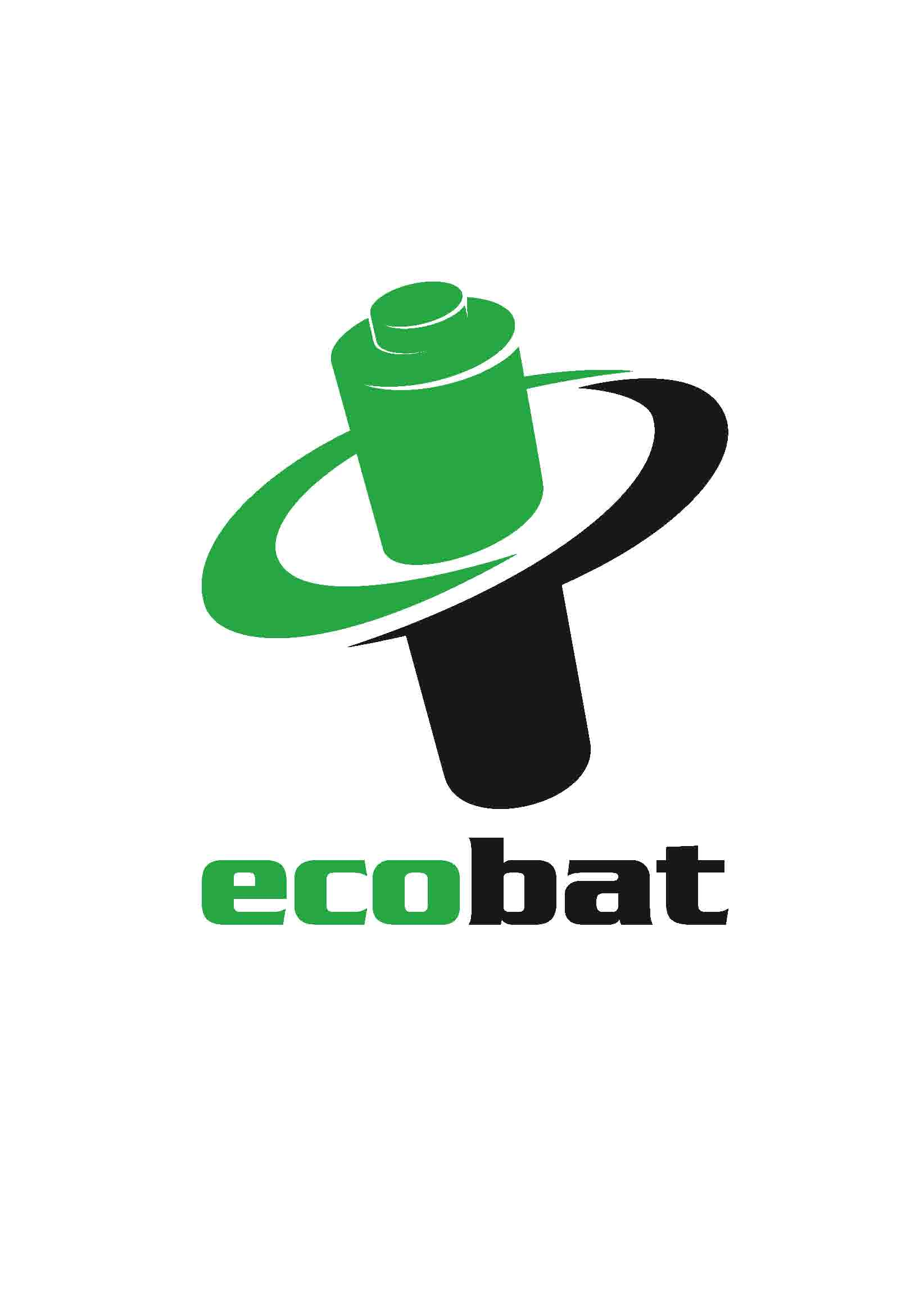 Logo společnosti ECOBAT s.r.o.